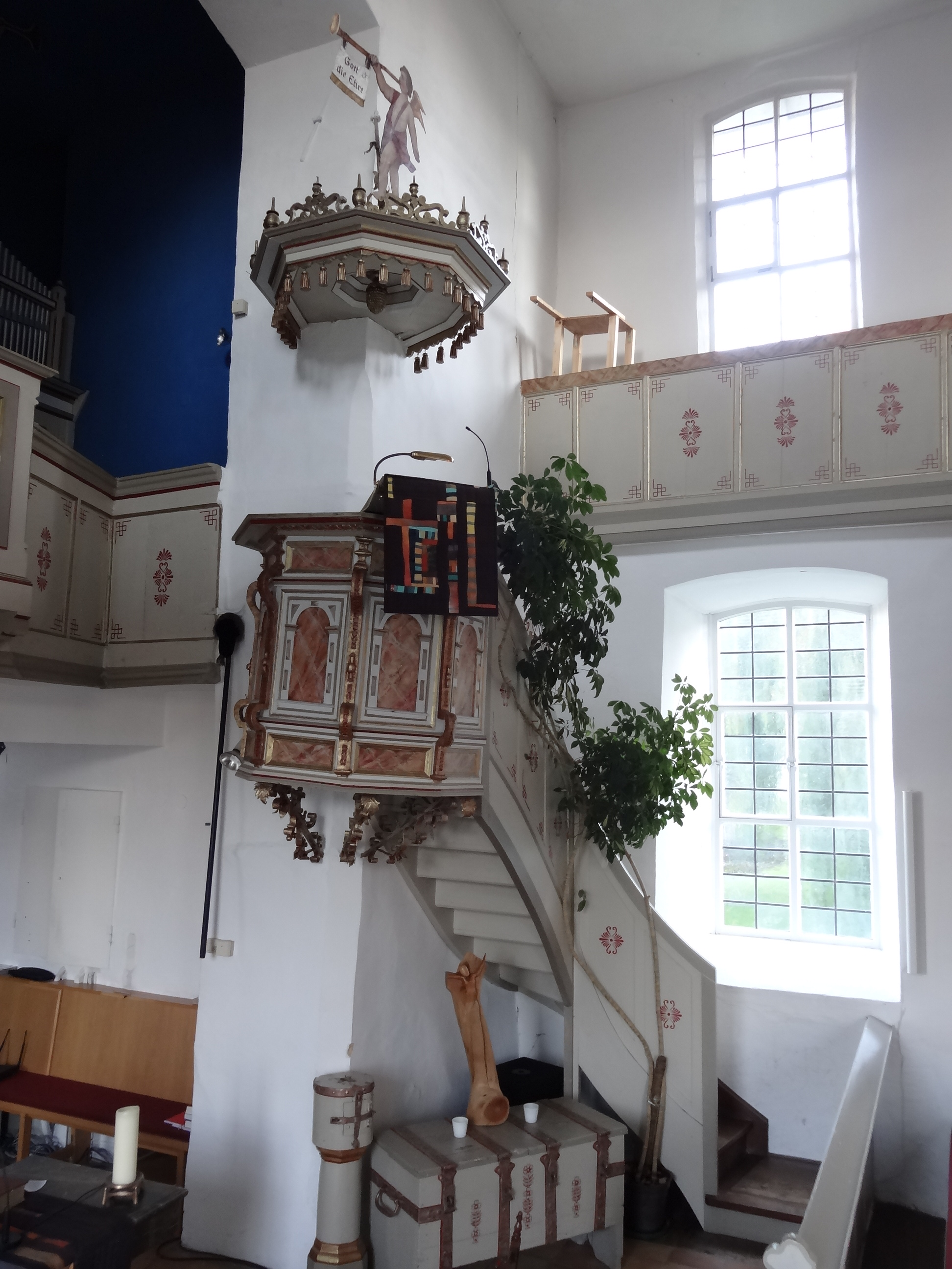 Evangelische Kirche Villingen (Hungen)